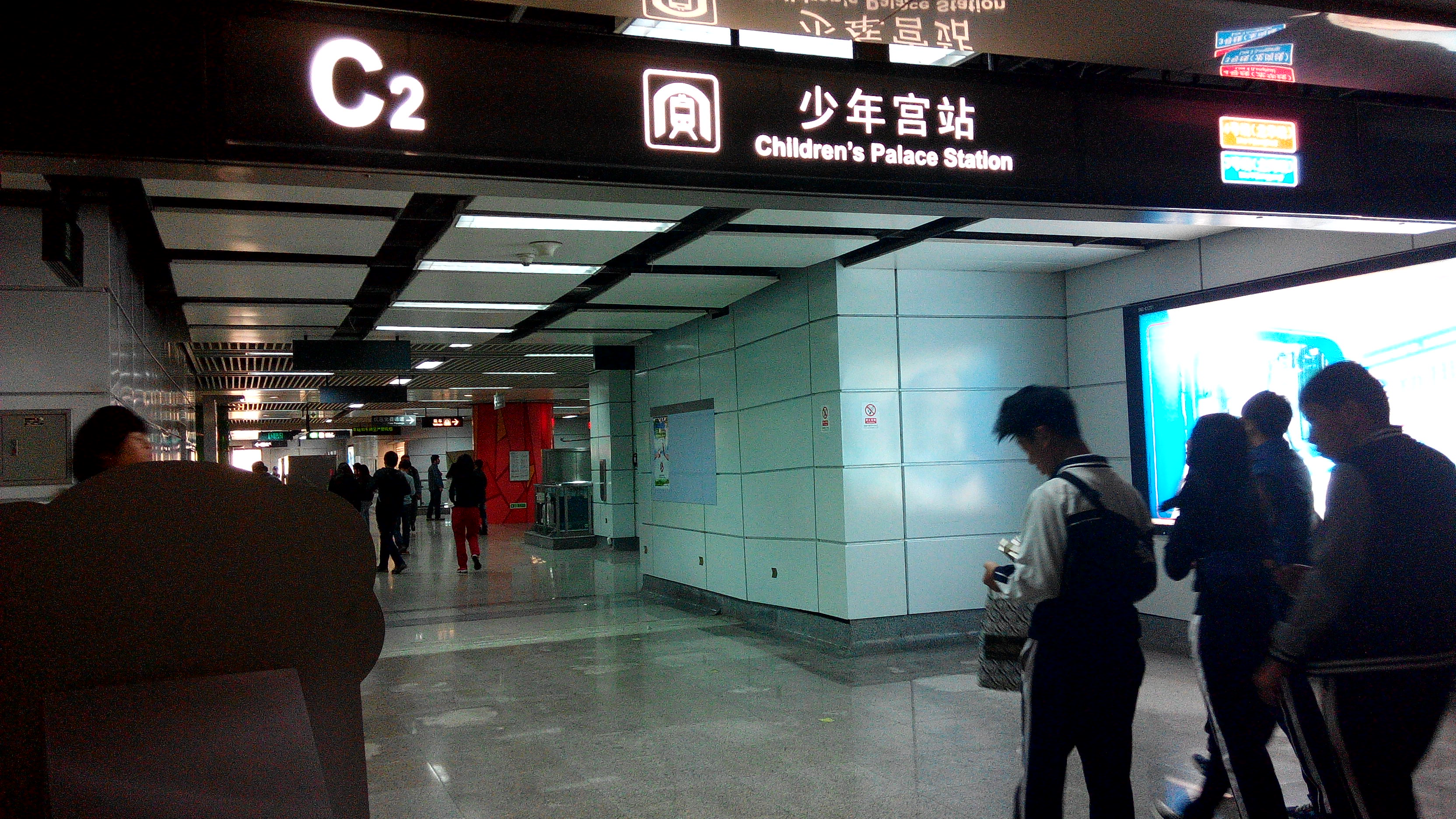 深圳地铁少年宫站与深圳中心书城联通的C2出口